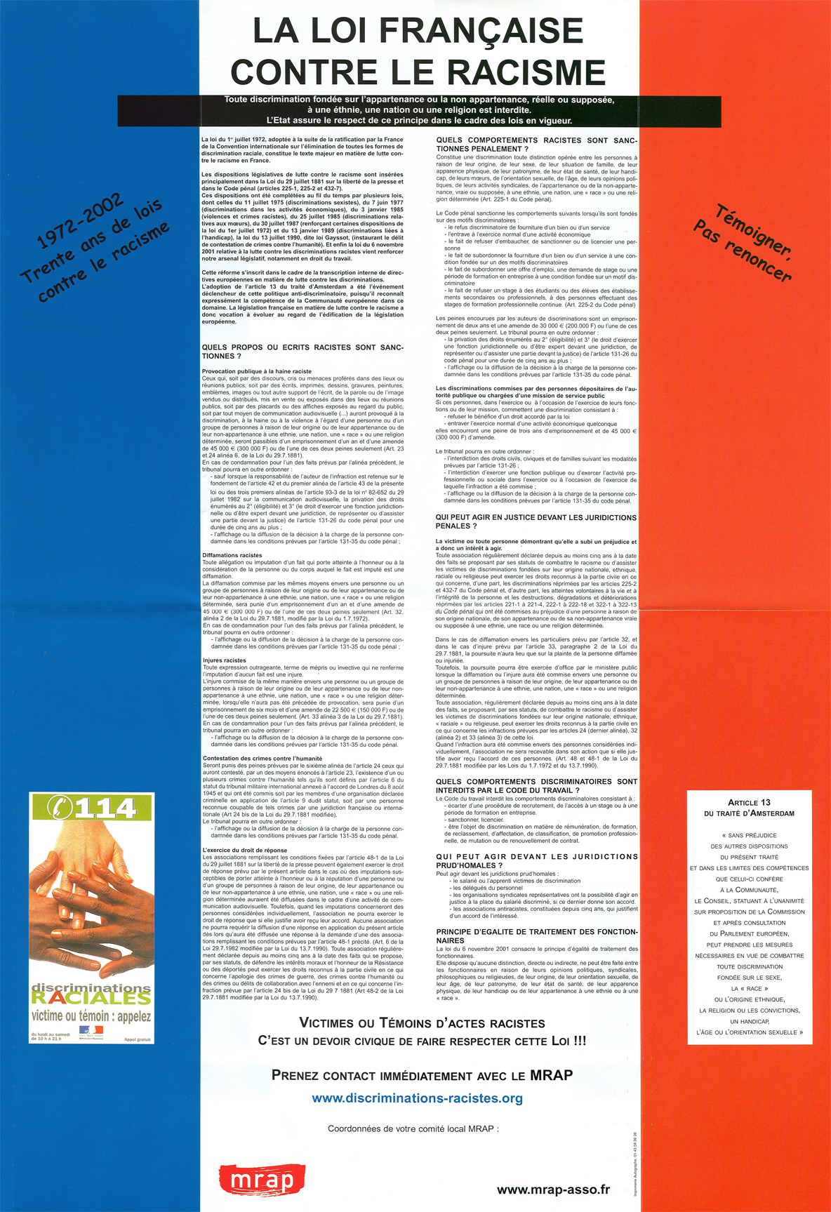 Affiche Loi Pleven contre le racisme